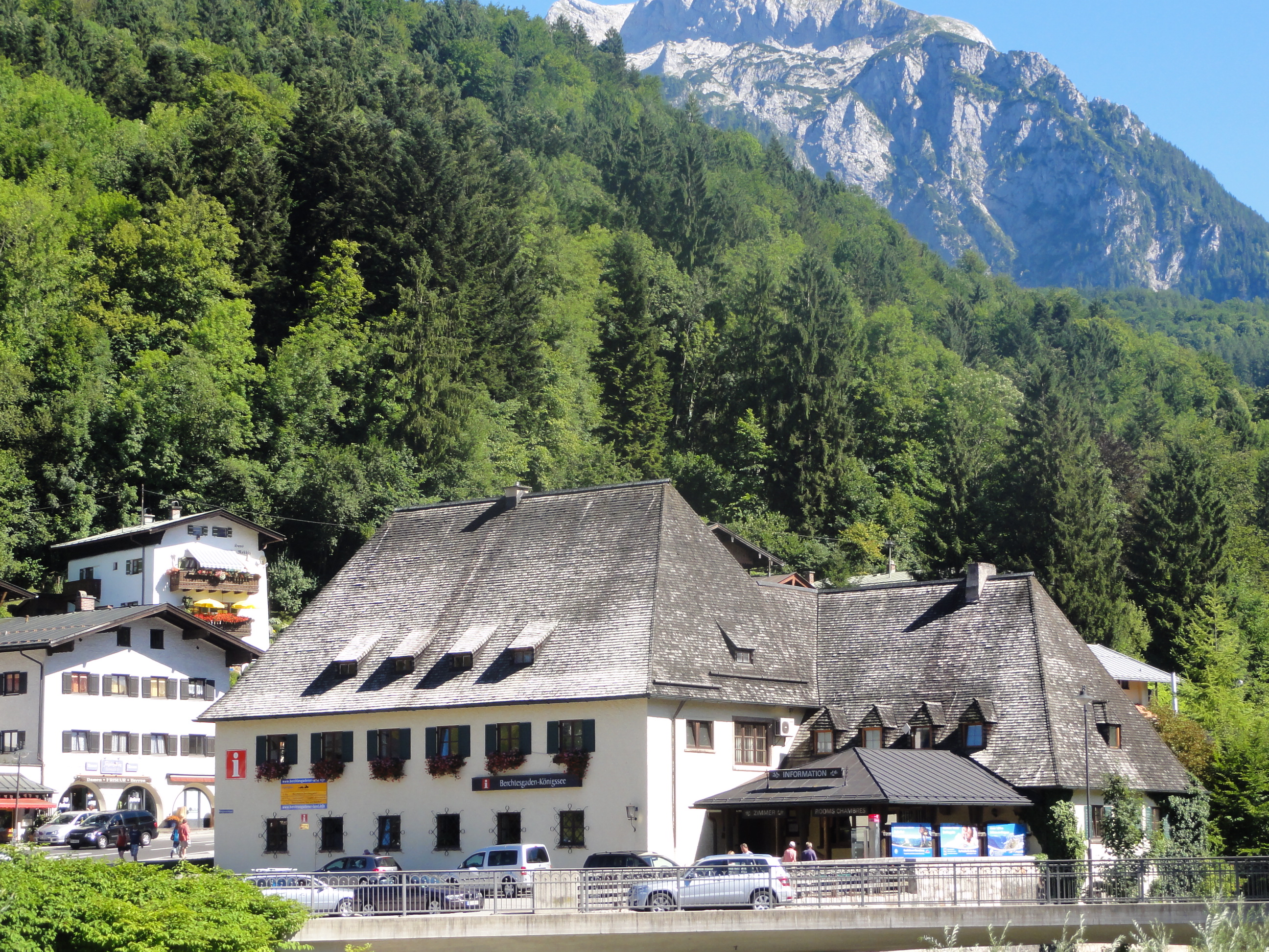 Germany, Berchtesgaden, Königsseer Str. 2